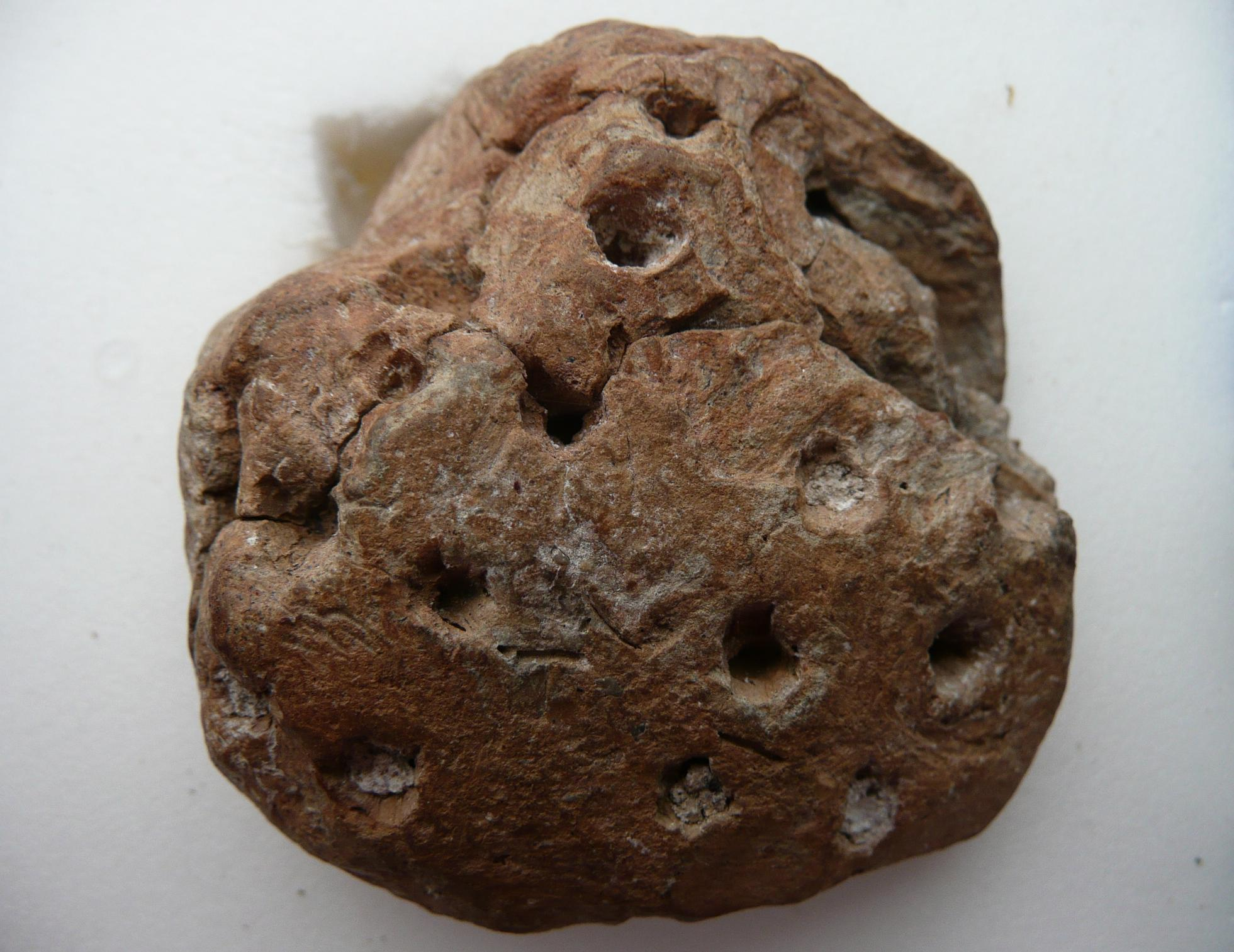 Pintadera (?)